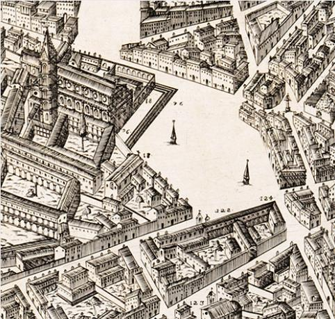 Mappa del 1584 riproducente la zona di S.Maria Novella Firenze in cui si trovava lo Spedale di S.Paolo